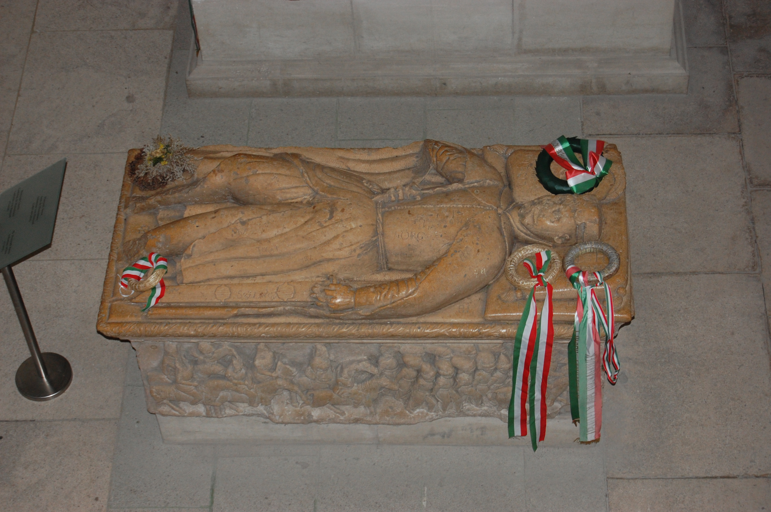 Gyulafehérvár, Szent Mihály Székesegyház - Hunyadi János szarkofágja